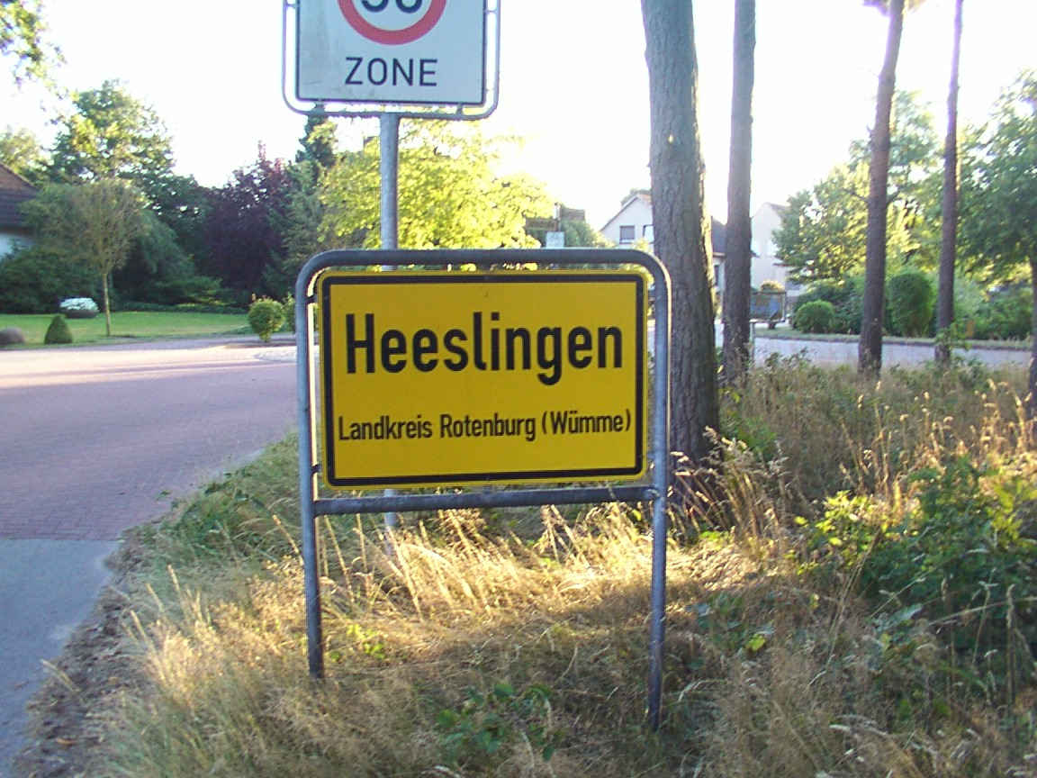 Germany, Heeslingen